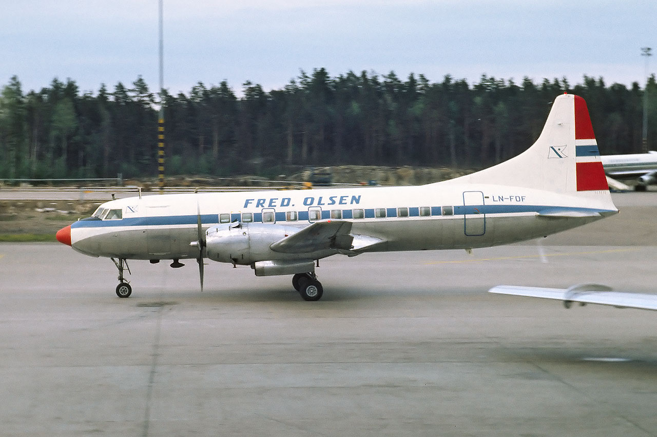 Fred Olsen Convair 340-32 LN-FOF at Stockholm-Arlanda Airport